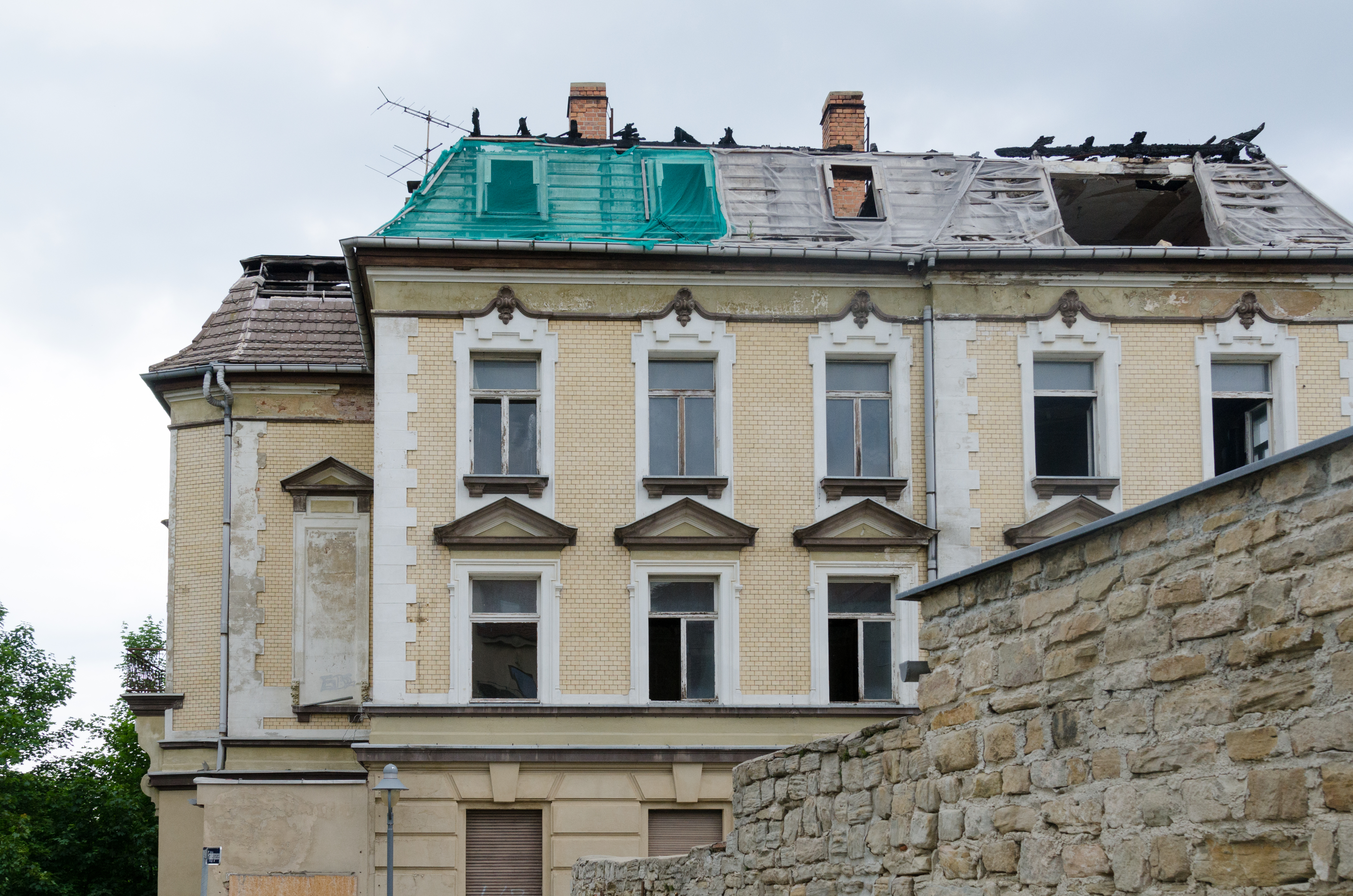 Zeitz, An der Stadtmauer 8